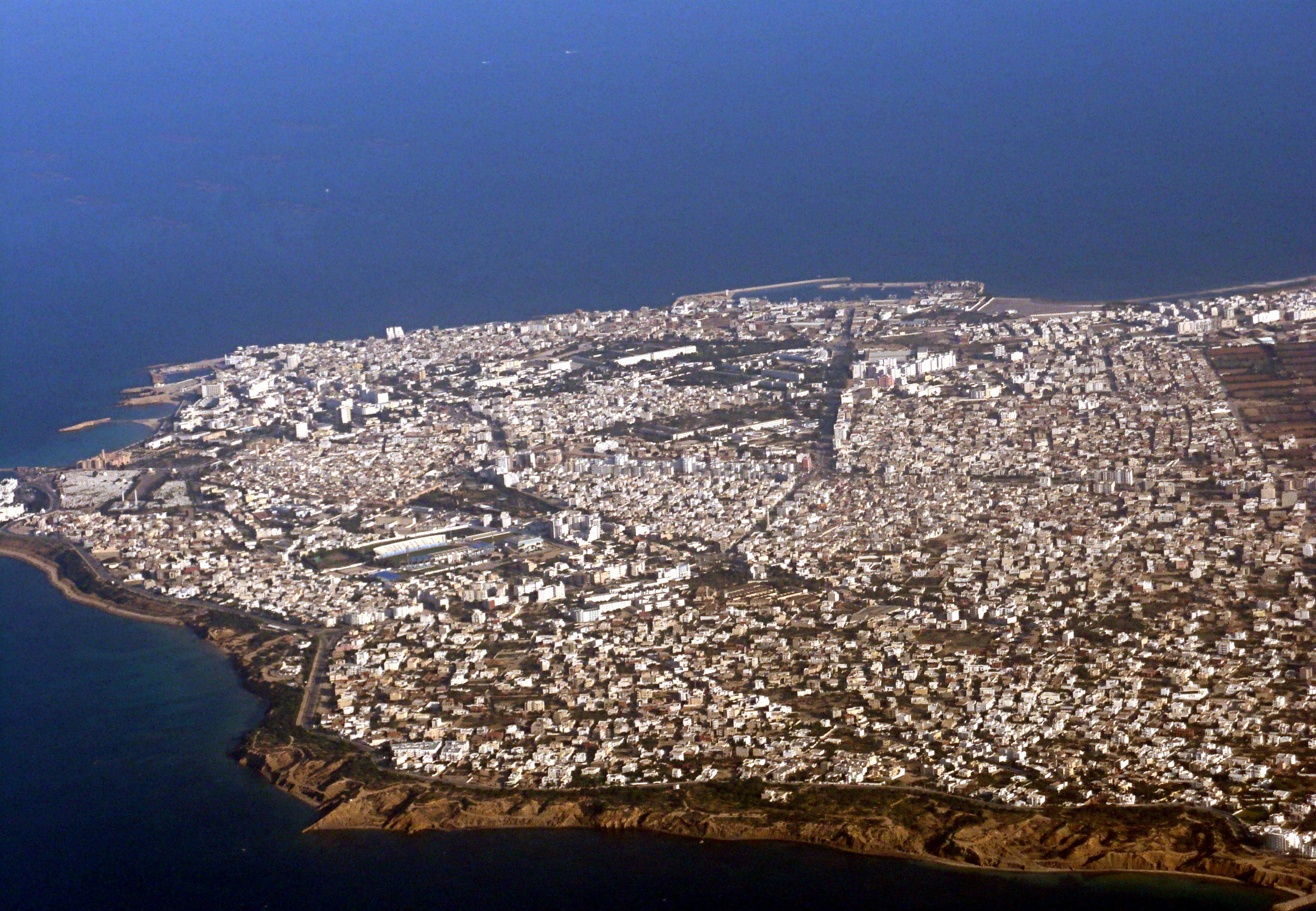 Monastyr z okna samolotu